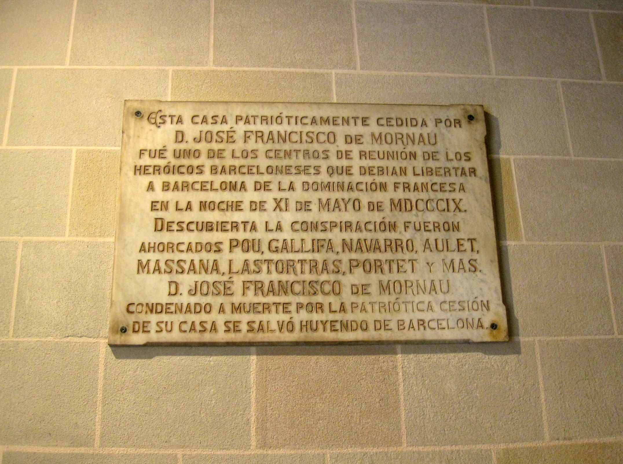 Josep Francesc Mornau. C. Ample, 35 (Barcelona)